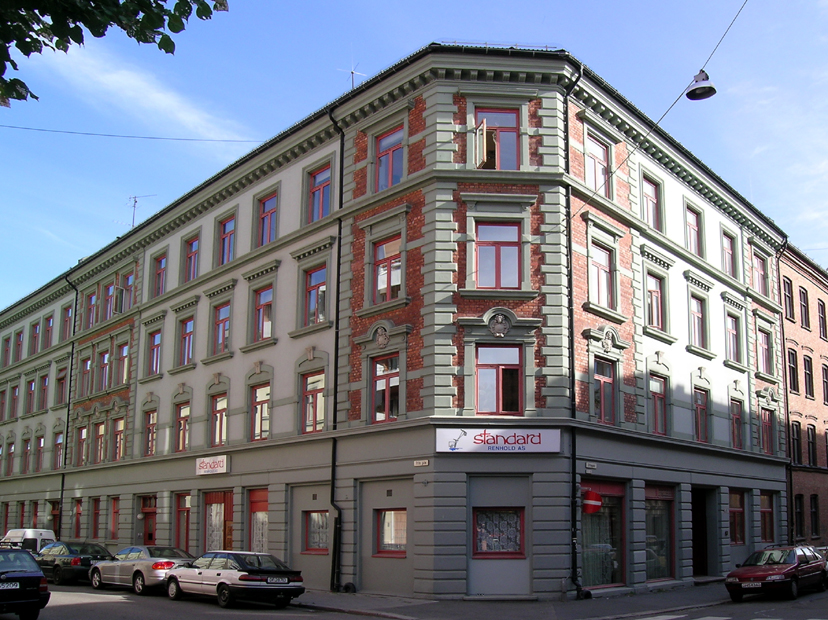 Urtegata 32, Oslo. Built 1898. Architect: Julius Foseid.